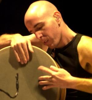 זהר פרסקו בהופעה